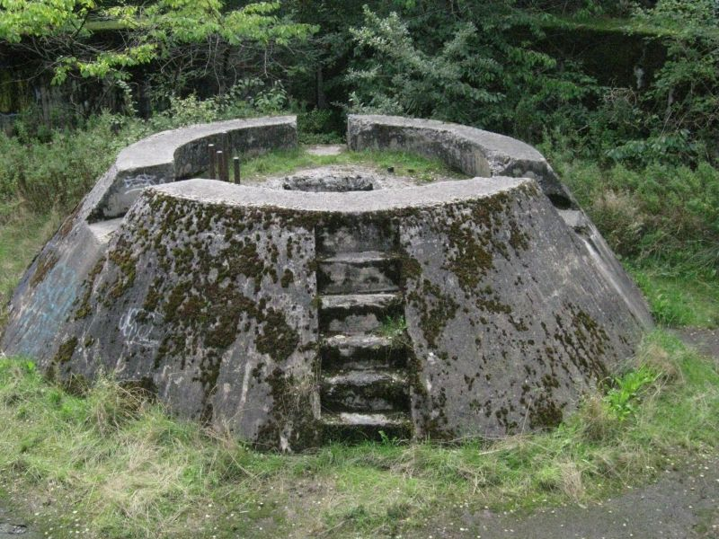 Geschützturm im Inneren der Batterie